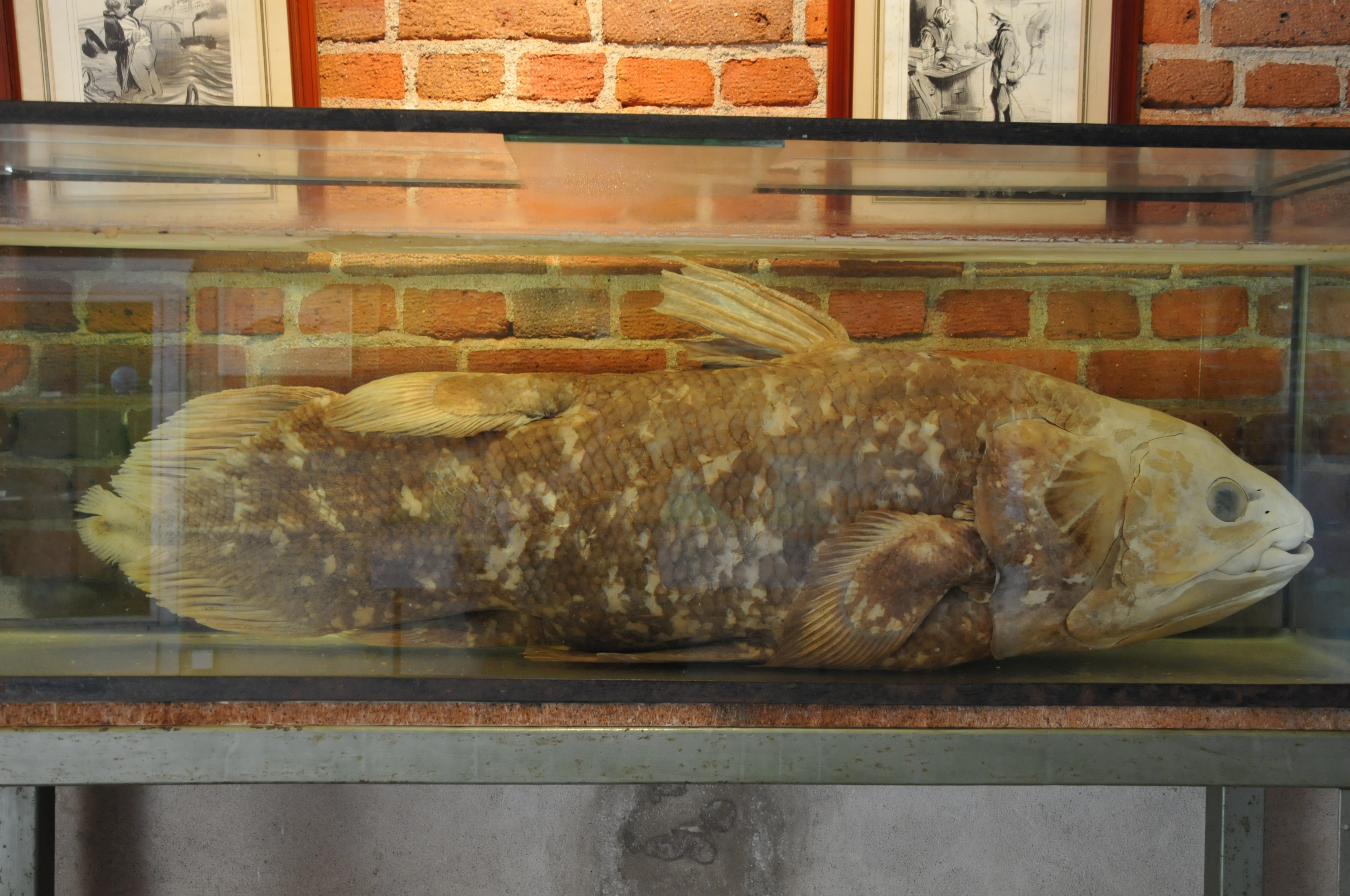 Schloss La Bussière, Quastenflosser in der Fischereiausstellung